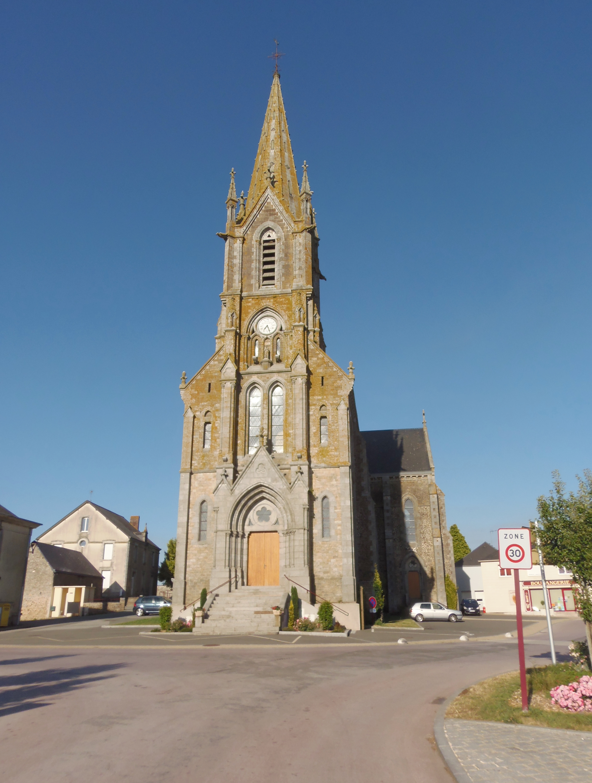 Courcité (Pays de la Loire, France). L'église Saint-Pierre-et-Saint-Paul